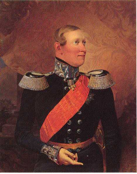 Paul Frederik van Mecklenburg